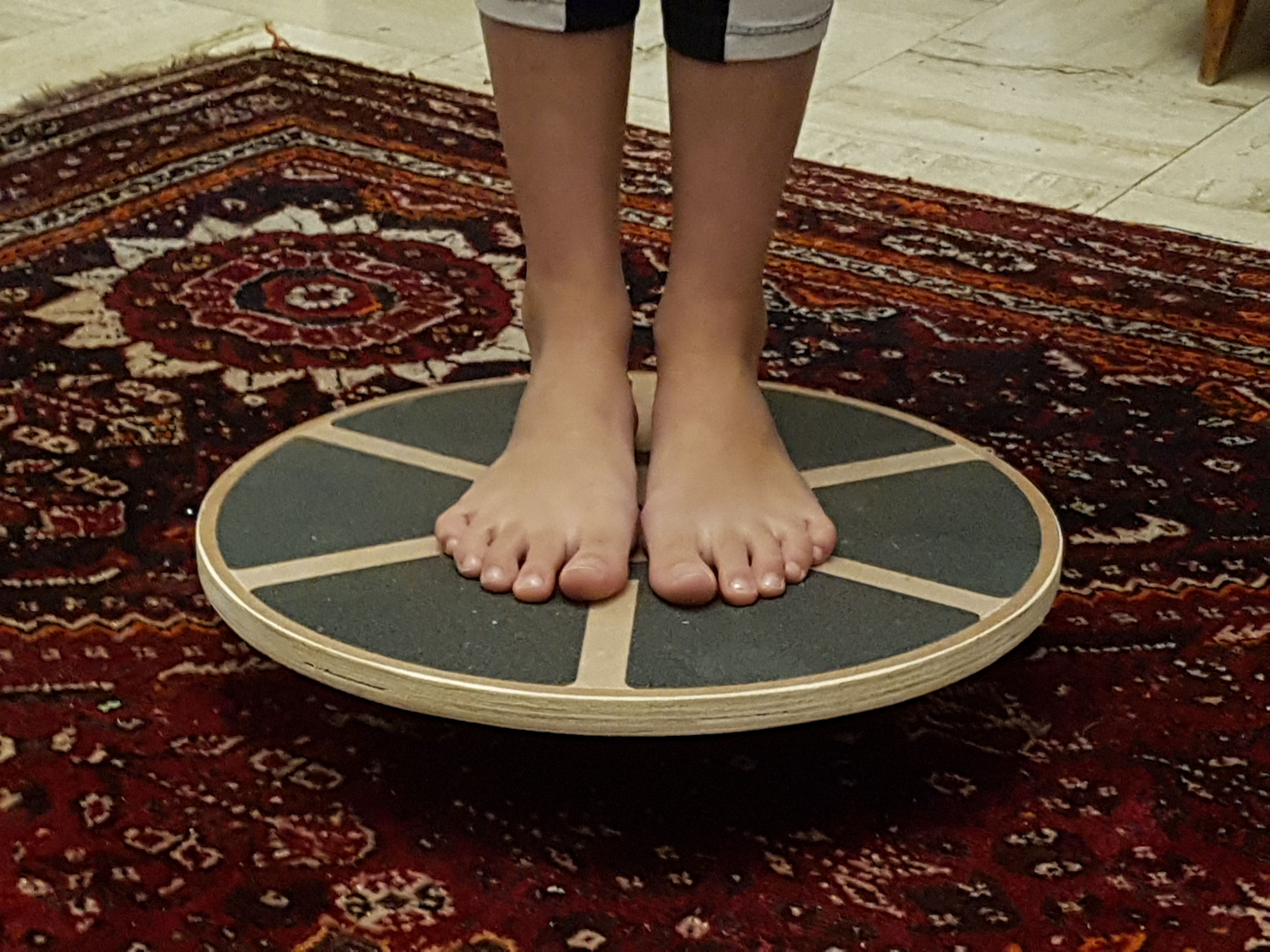 Equilibre à deux pieds sur un plateau de proprioception